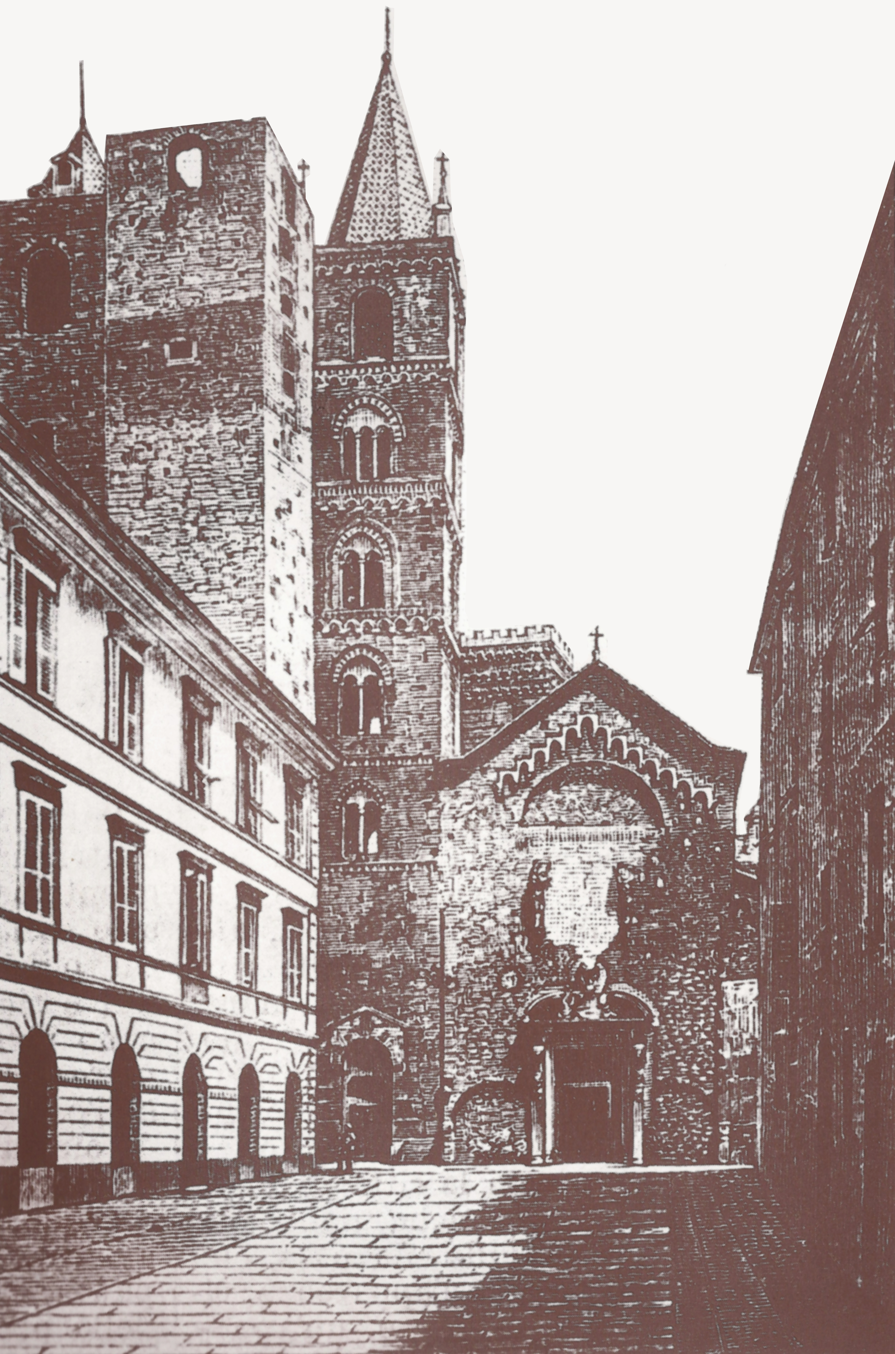 Disegno di Piazza San Michele nell'ottocento